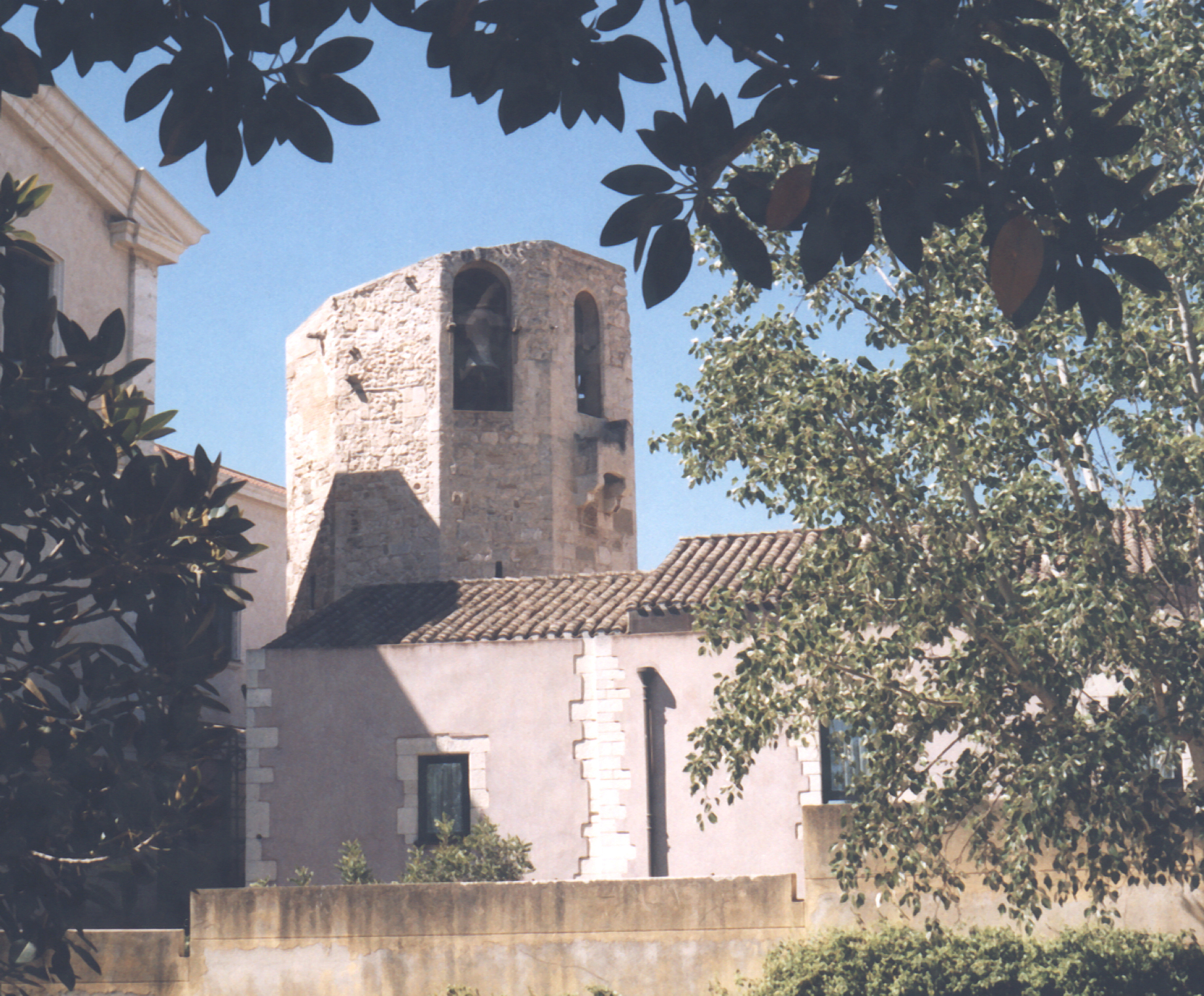 Cagliari, torre aragonese (XIV) del Santuario di Bonaria